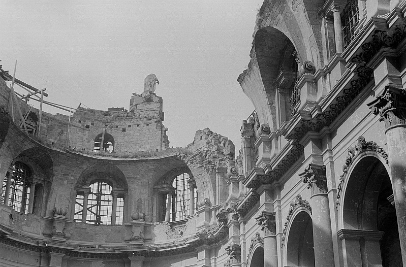 Original image description from the Deutsche FotothekZerstörtes Dach der Hofkirche